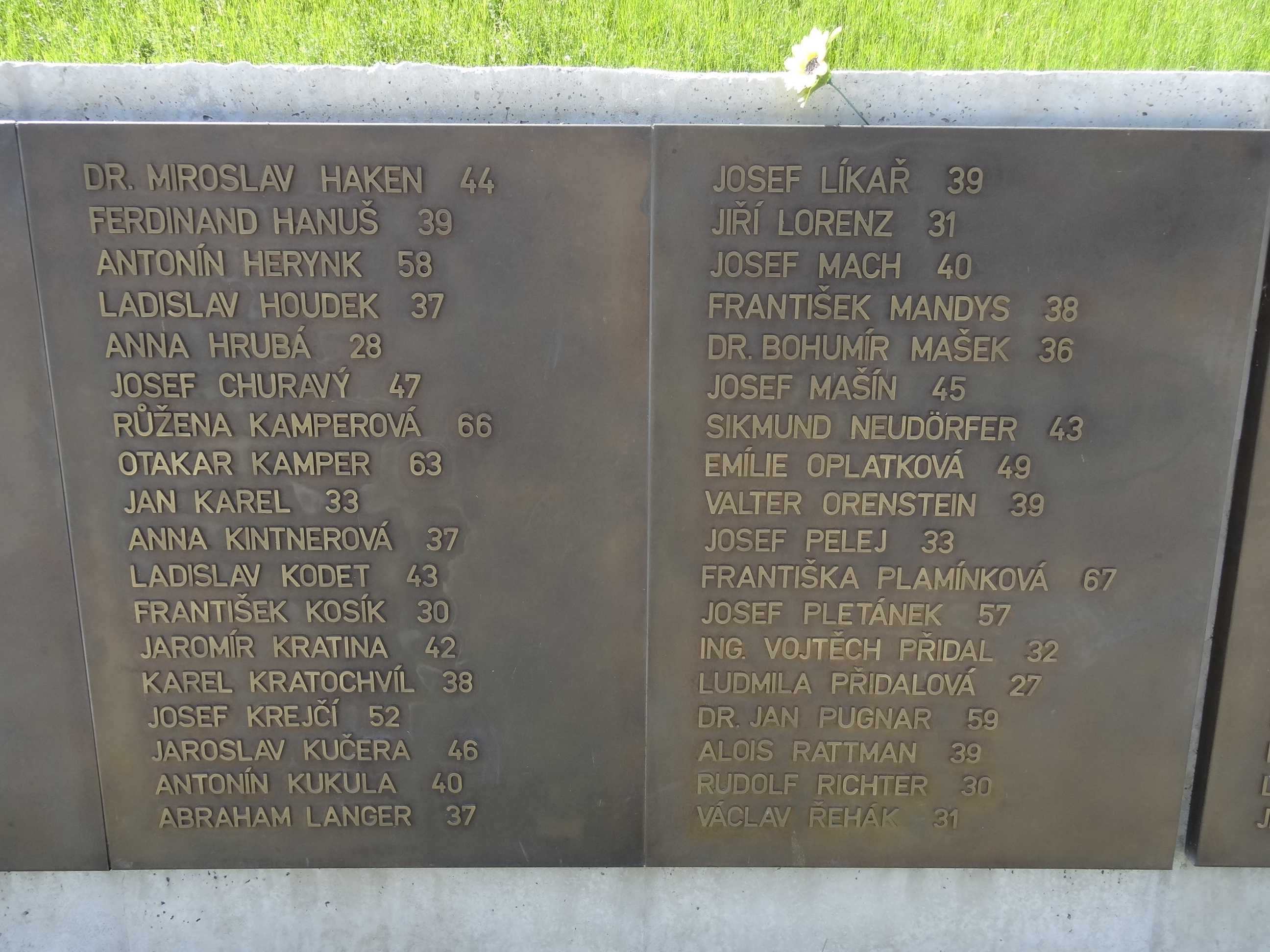 Kobyliská střelnice - pamětní desky se jmény popravených